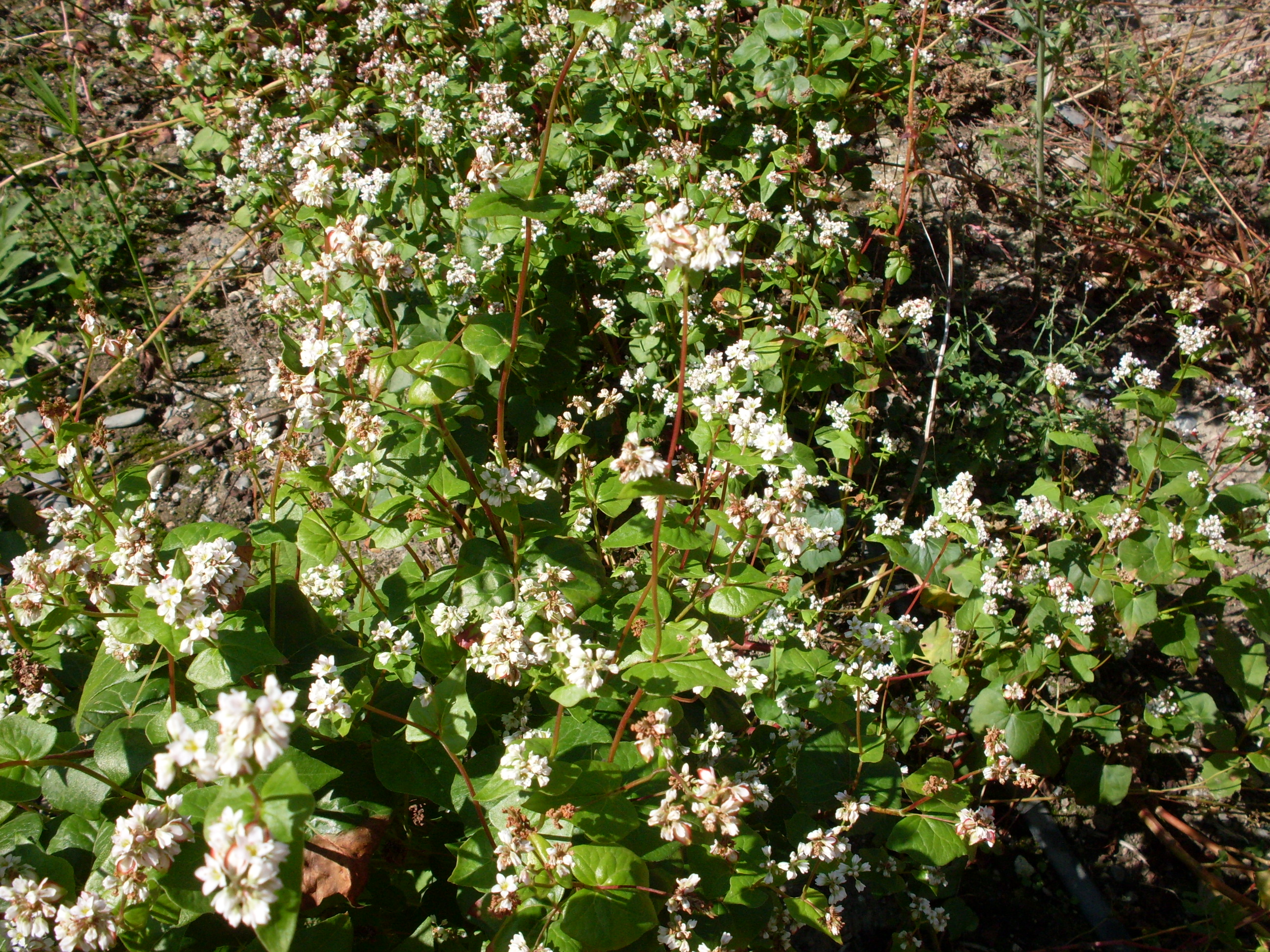 Sarrasin (blé noir) dans le jardin botanique Henri-Gaussen, Toulouse, France